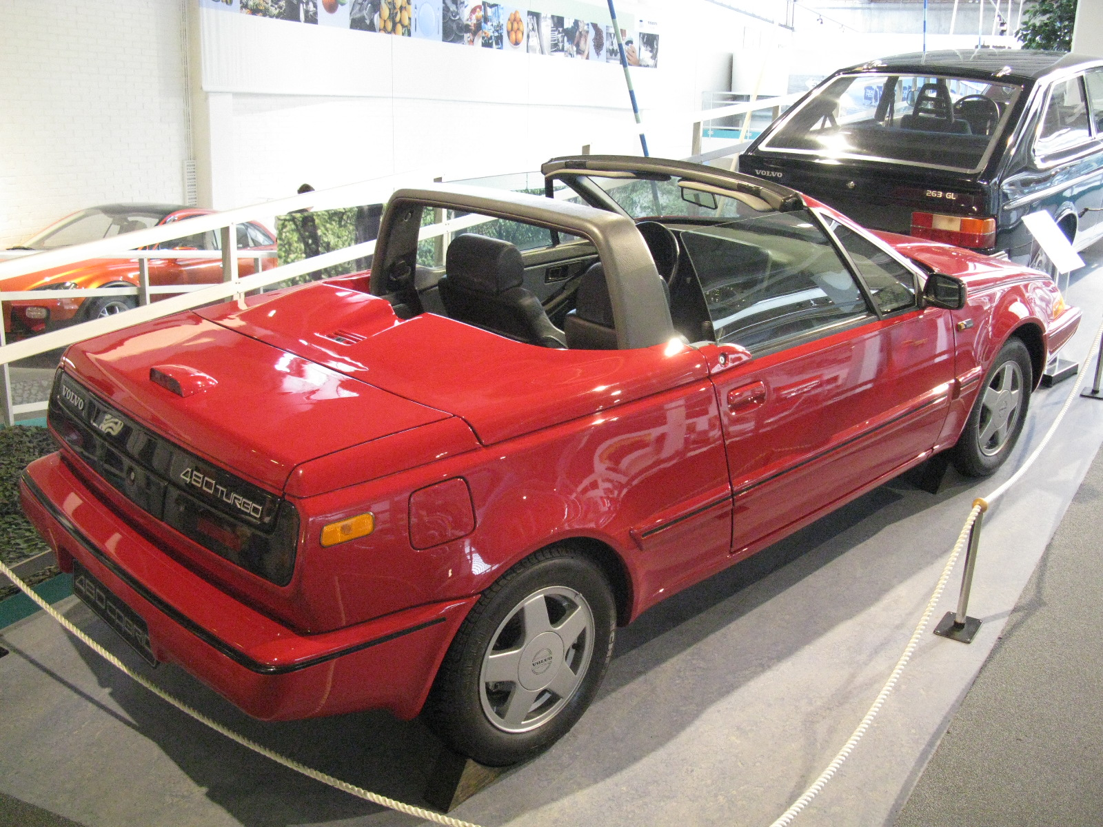 Volvo 480 Turbo Cabriolet